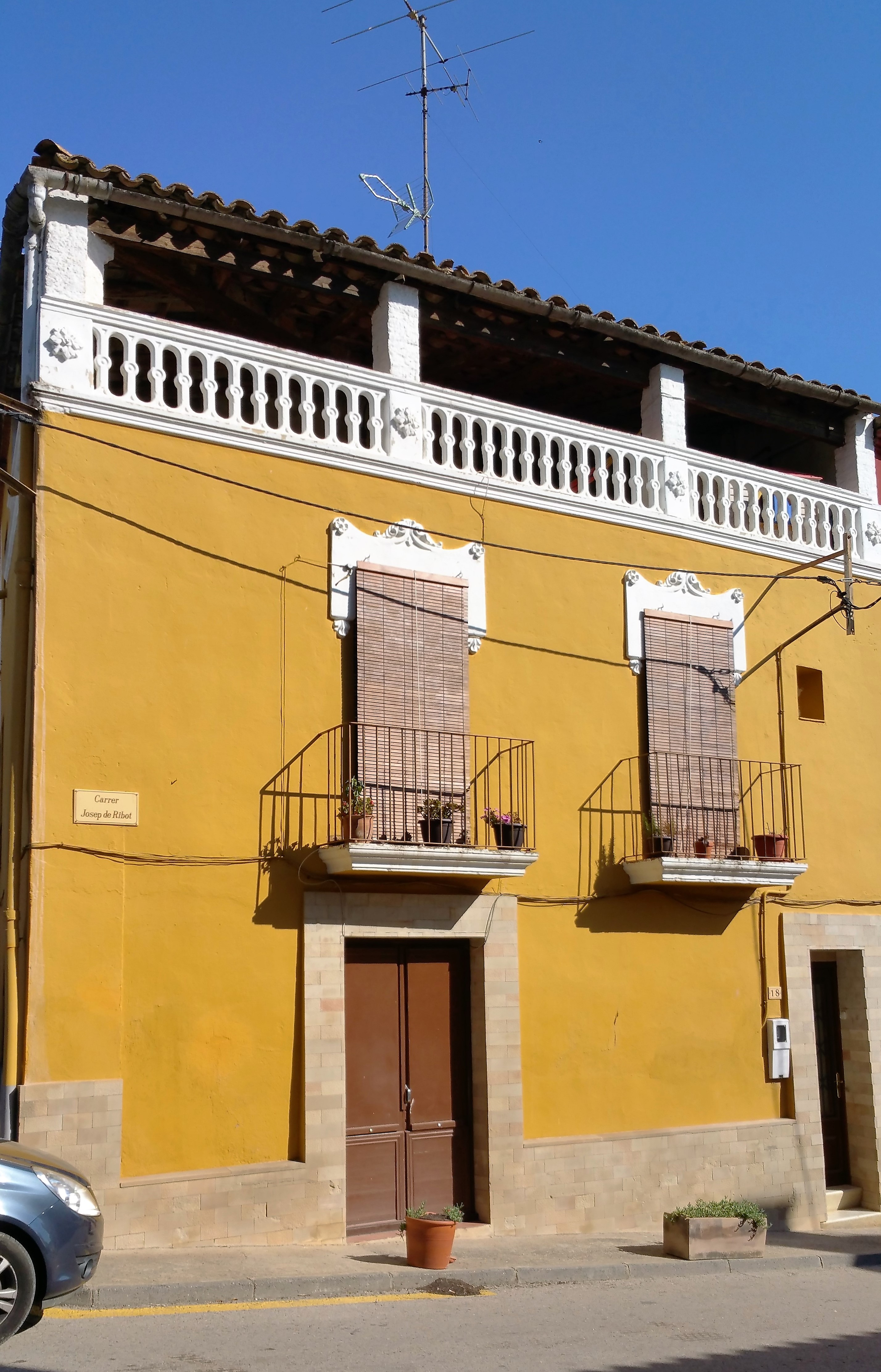 Casa al carrer Josep Ribot, 18 (Saus, Camallera i Llampaies)